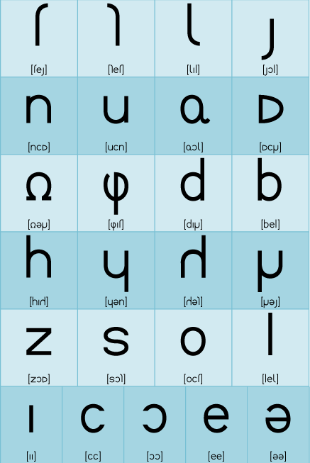 アルカ-幻字-小文字